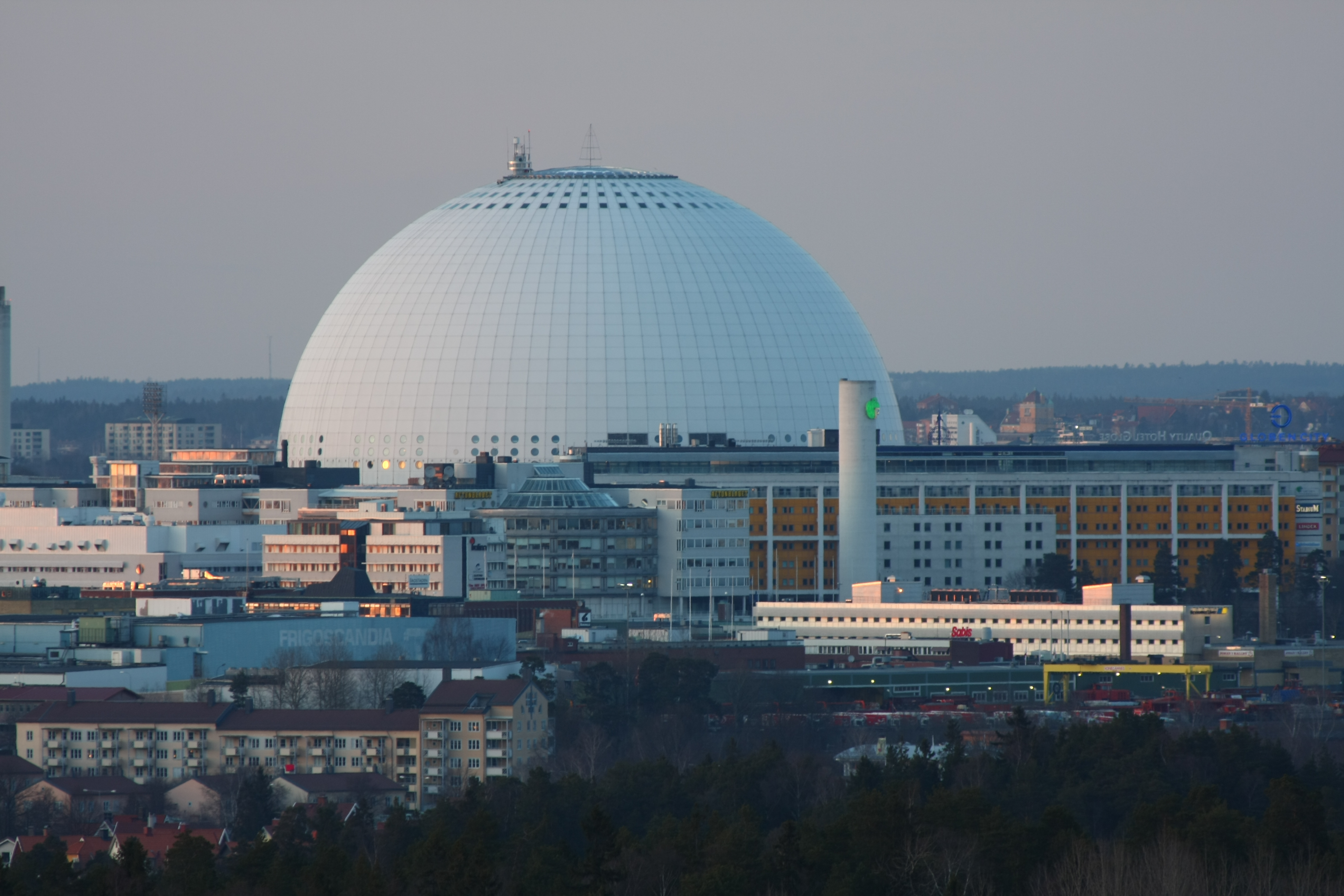 GLOBEN